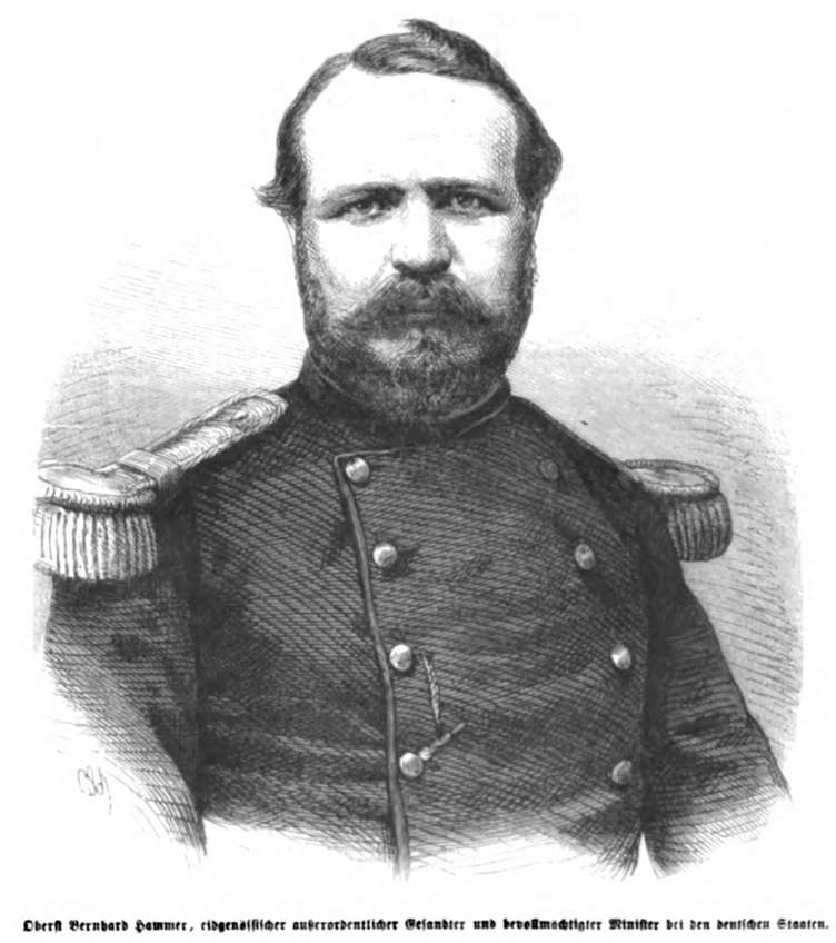 Oberst Bernhard Hammer, schweizer Minister, 1868.